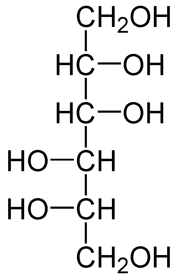 Mannit, Manitol